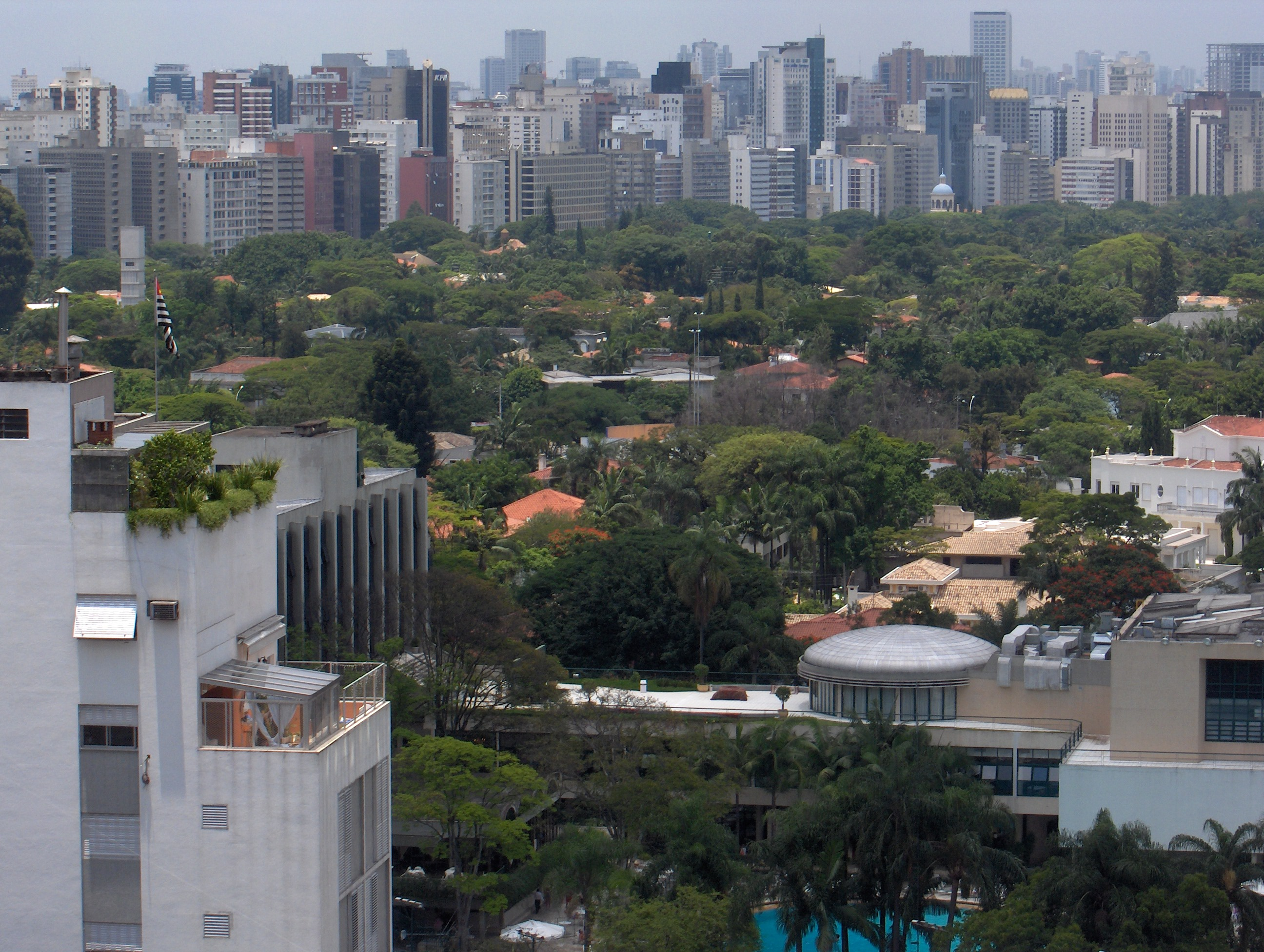 Jardim Europa visto de cima.